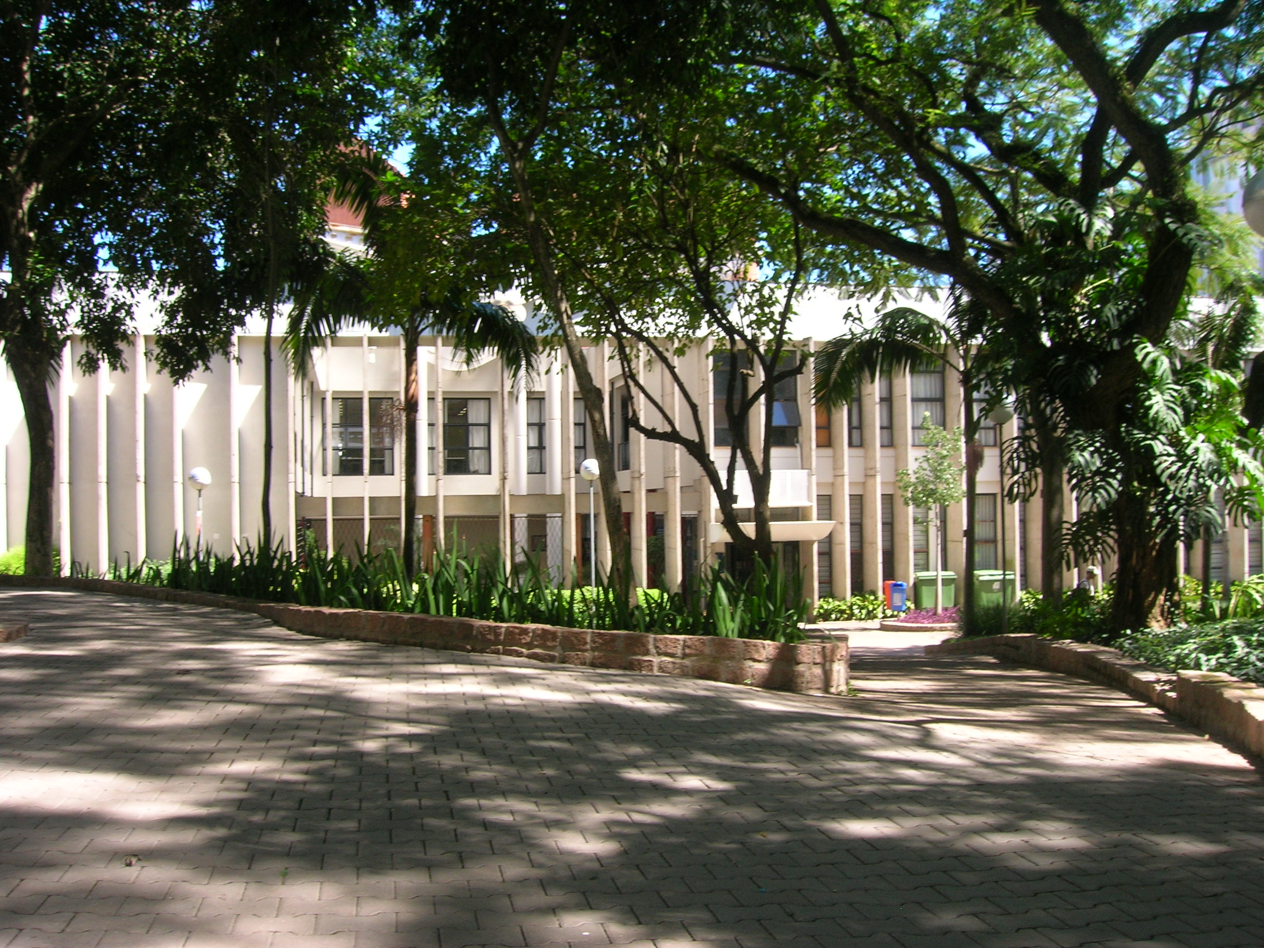 O Prédio 9 da Pontificía Universidade Católica do Rio Grande do Sul (PUCRS), que abriga a Faculdade de Arquitetura e Urbanismo (FAU) da instituição.